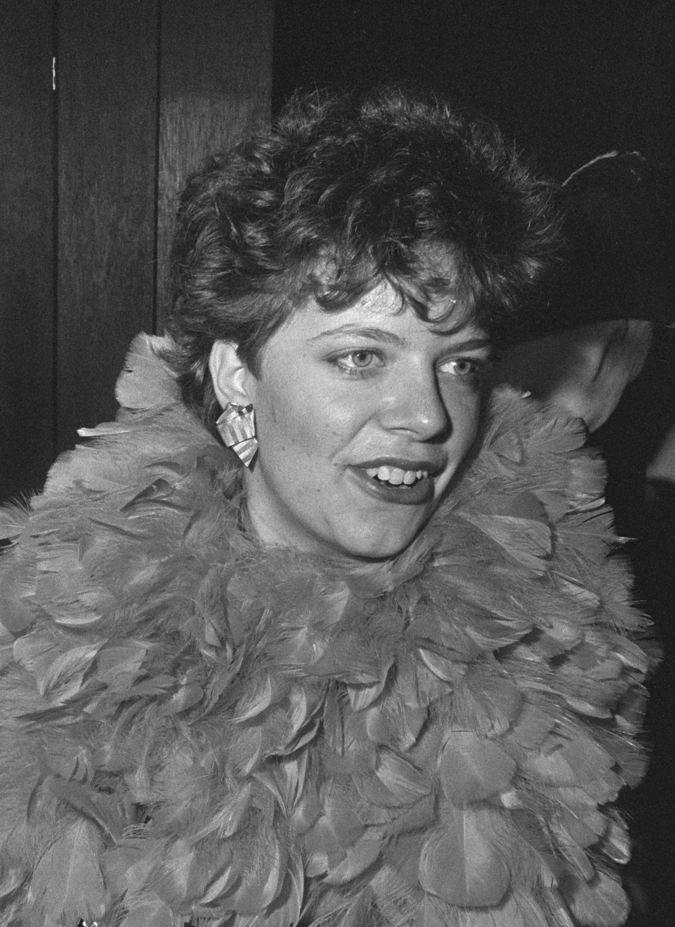 Elfstedentocht van Youp van 't Hek; "Rayonhoofd" Brigitte Kaandorp in Hindelopen.